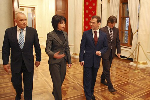 Интервью ведущим российским телеканалам